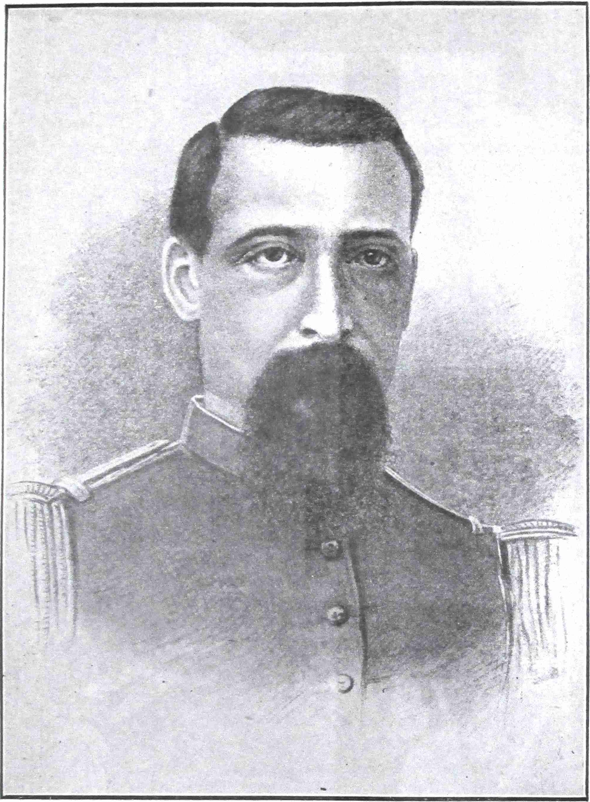 Coronel Manuel Roseti — Comandante del 1º de Línea.